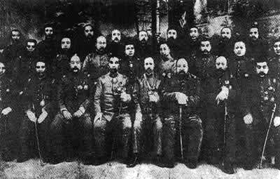 督军团合影。前排右起：蒋雁行、曹锟、张怀芝、孟恩远、王占元、李厚基、阎锡山；中排右起：师景云、徐树铮；后排右五起：倪嗣冲、陈光远、靳云鹏